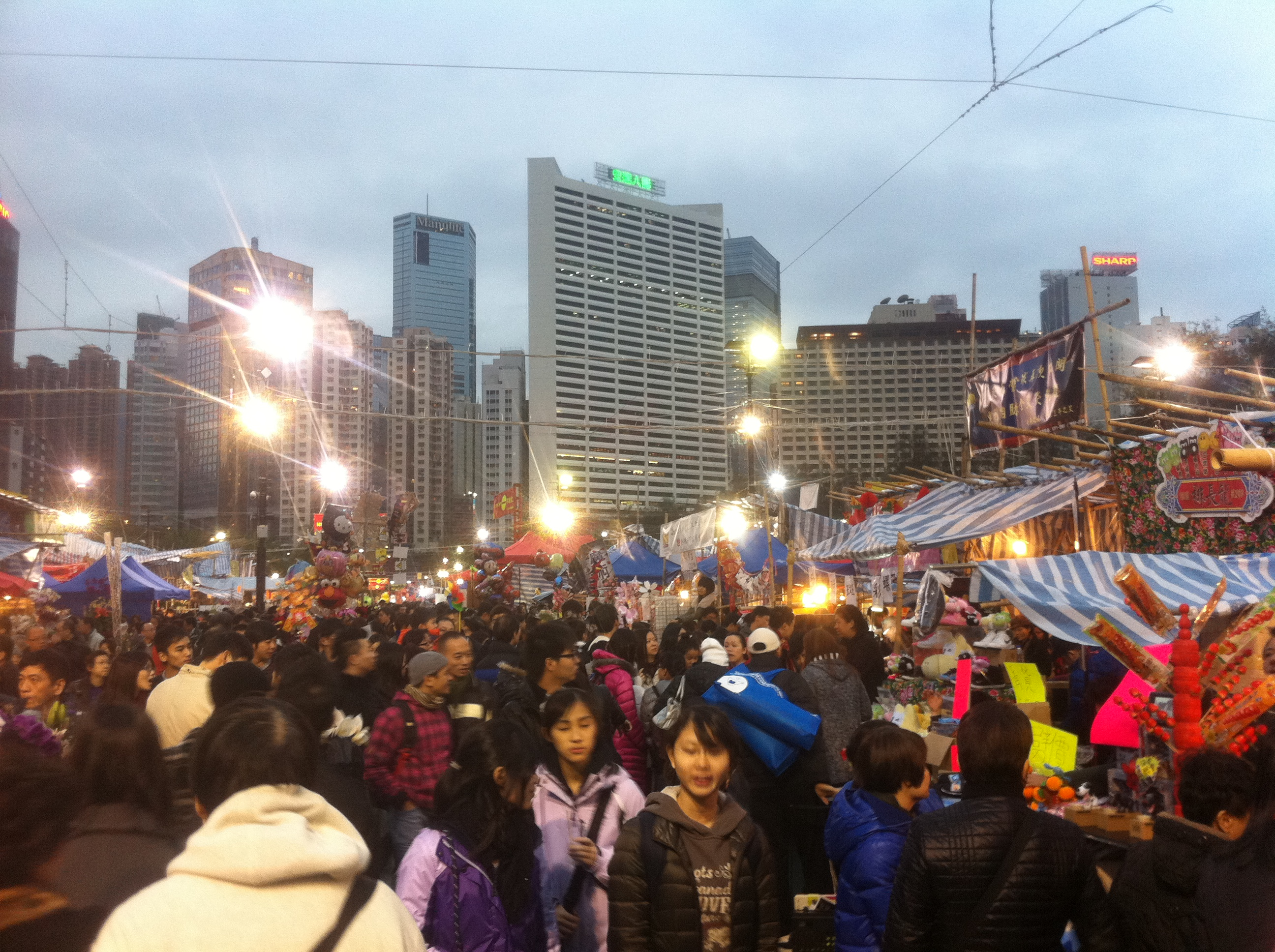 中文（香港）: 銅鑼灣 維園年宵市場 黃昏